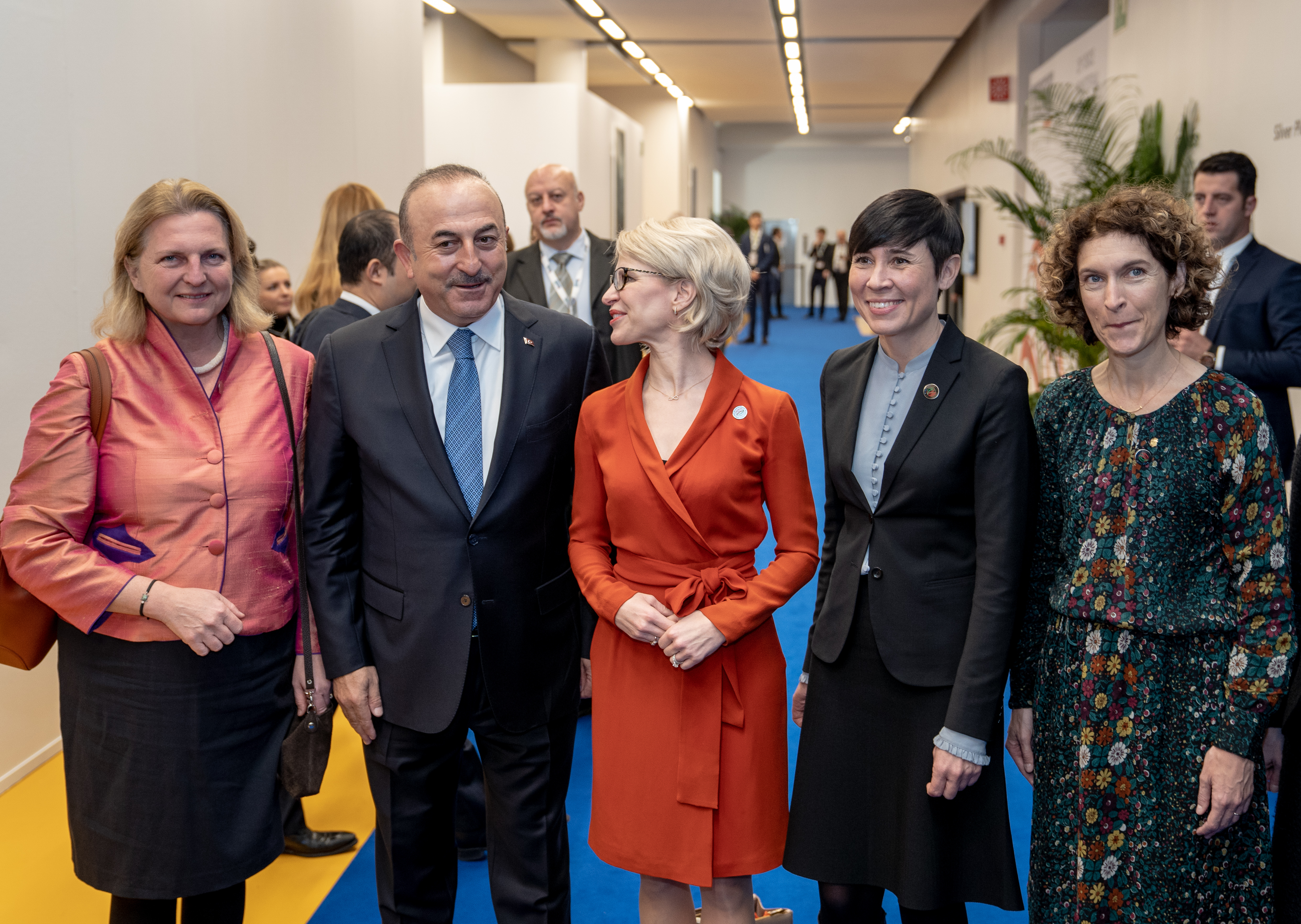 Außenministerin Karin Kneissl gemeinsam mit dem türkischen Außenminister Mevlüt Çavuşoğlu und den Außenministerinnen von Liechtenstein Aurelia Frick, Norwegen Ine Eriksen Soereide und Andorra Maria Ubach Font. Foto: BMEIA/Lauber